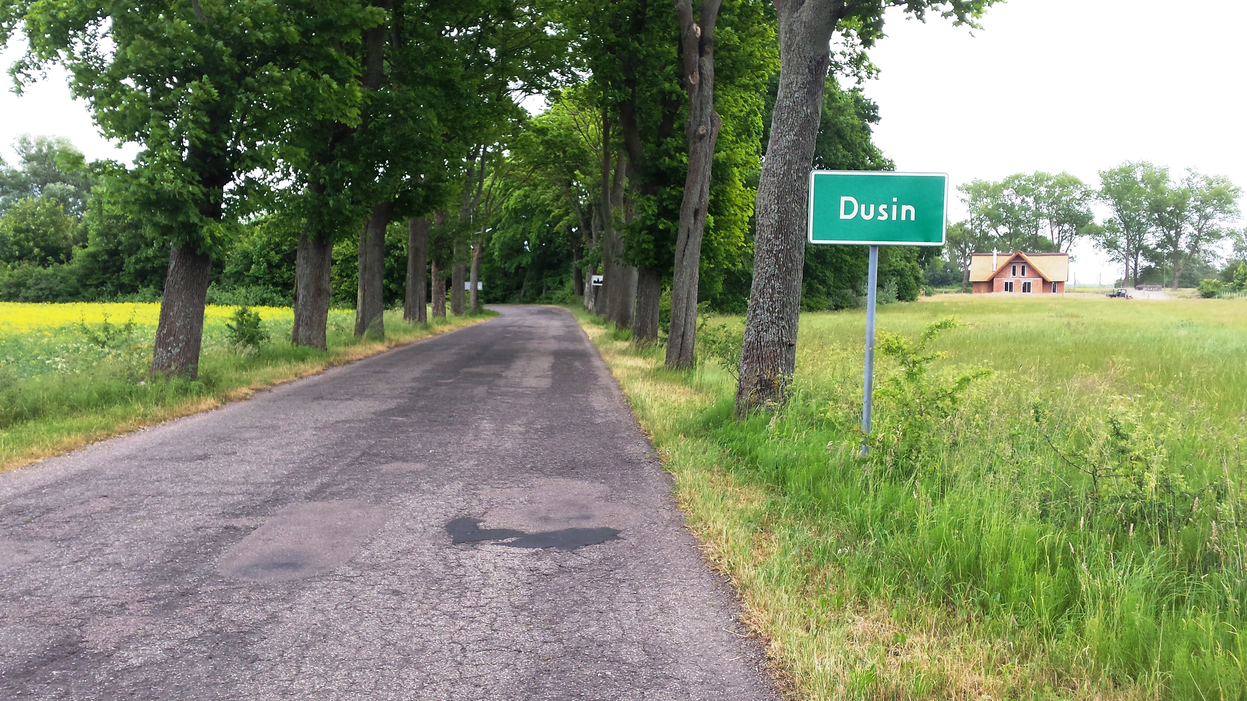 Dusin